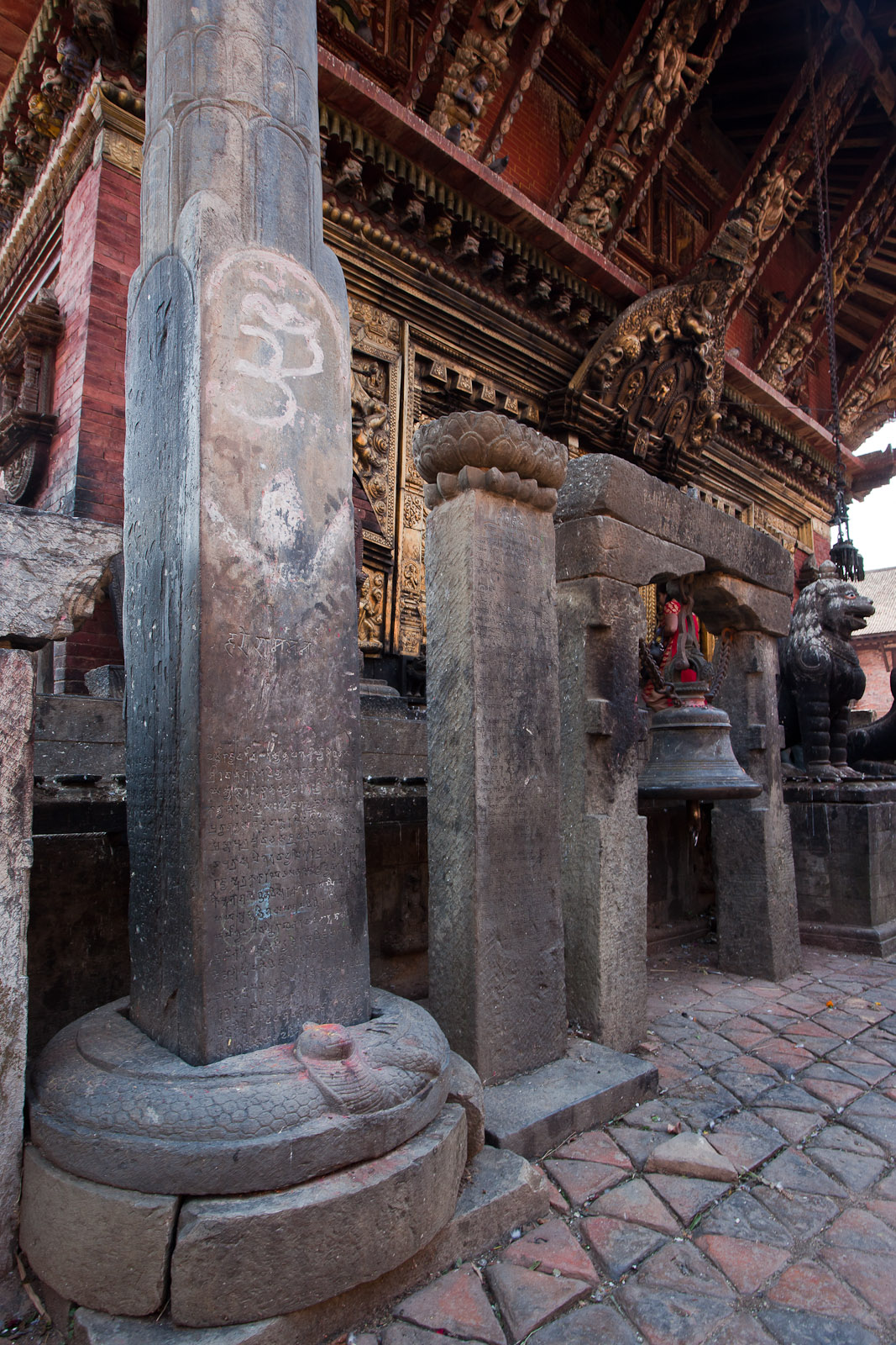 Changu Narayan